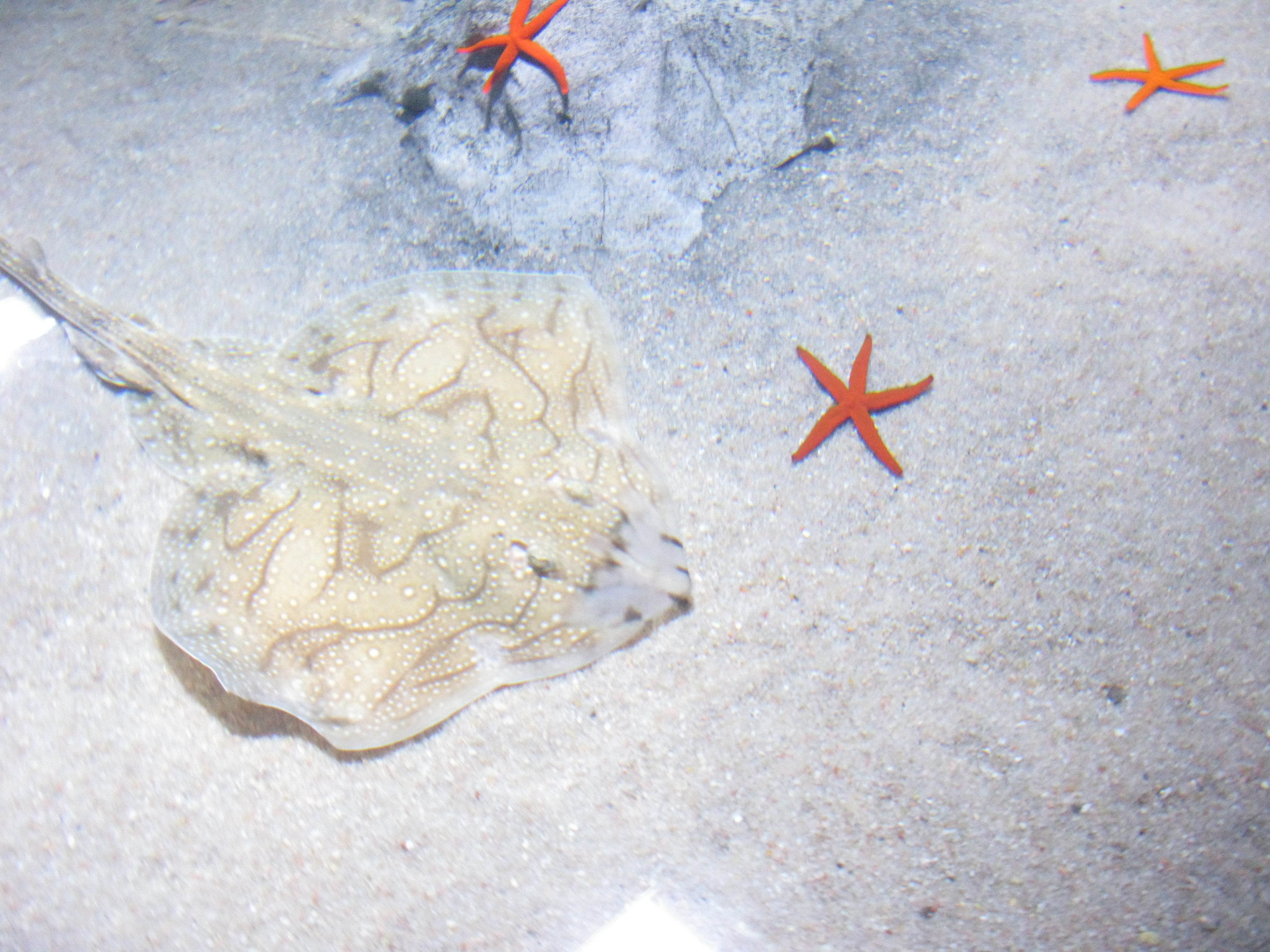 Undulate ray (Raja undulata)